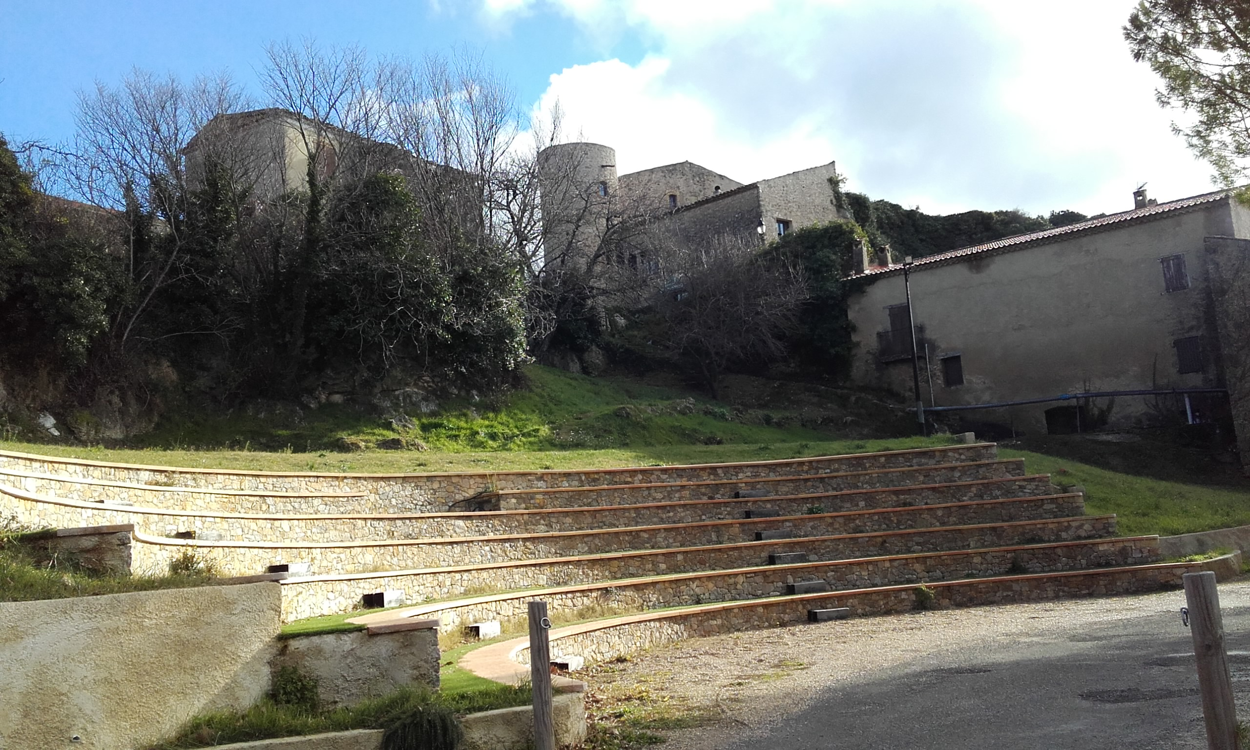 Var, Tourtour, Théâtre de verdure